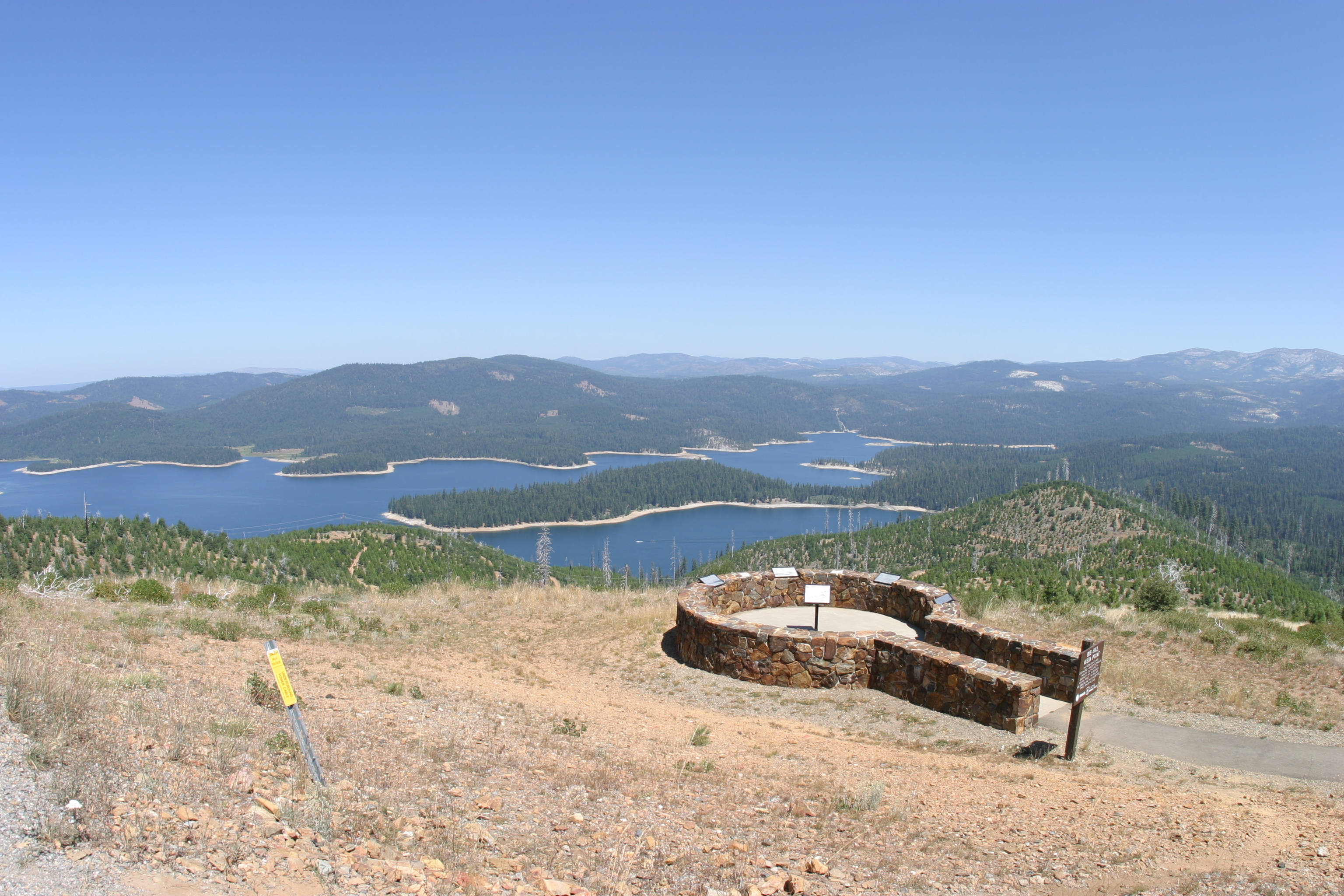 Big Hill Lookout